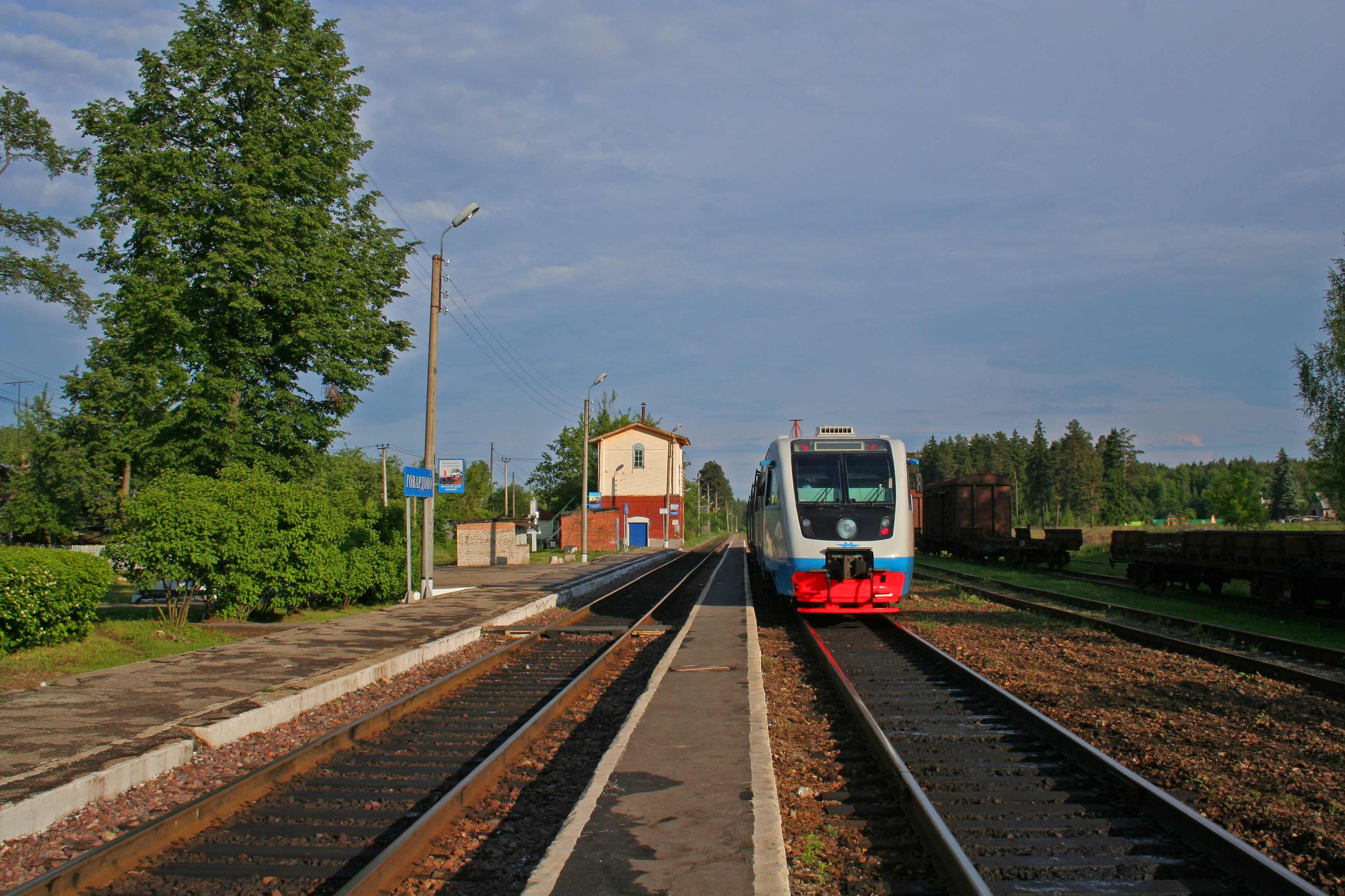 Stadt Kondrowo, Oblast Kaluga, Russland. Bahnhof Gowardowo.